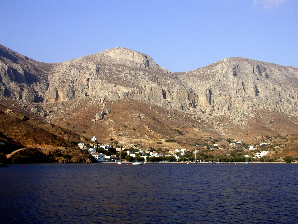 Ormos Empori auf der Insel Kalymnos